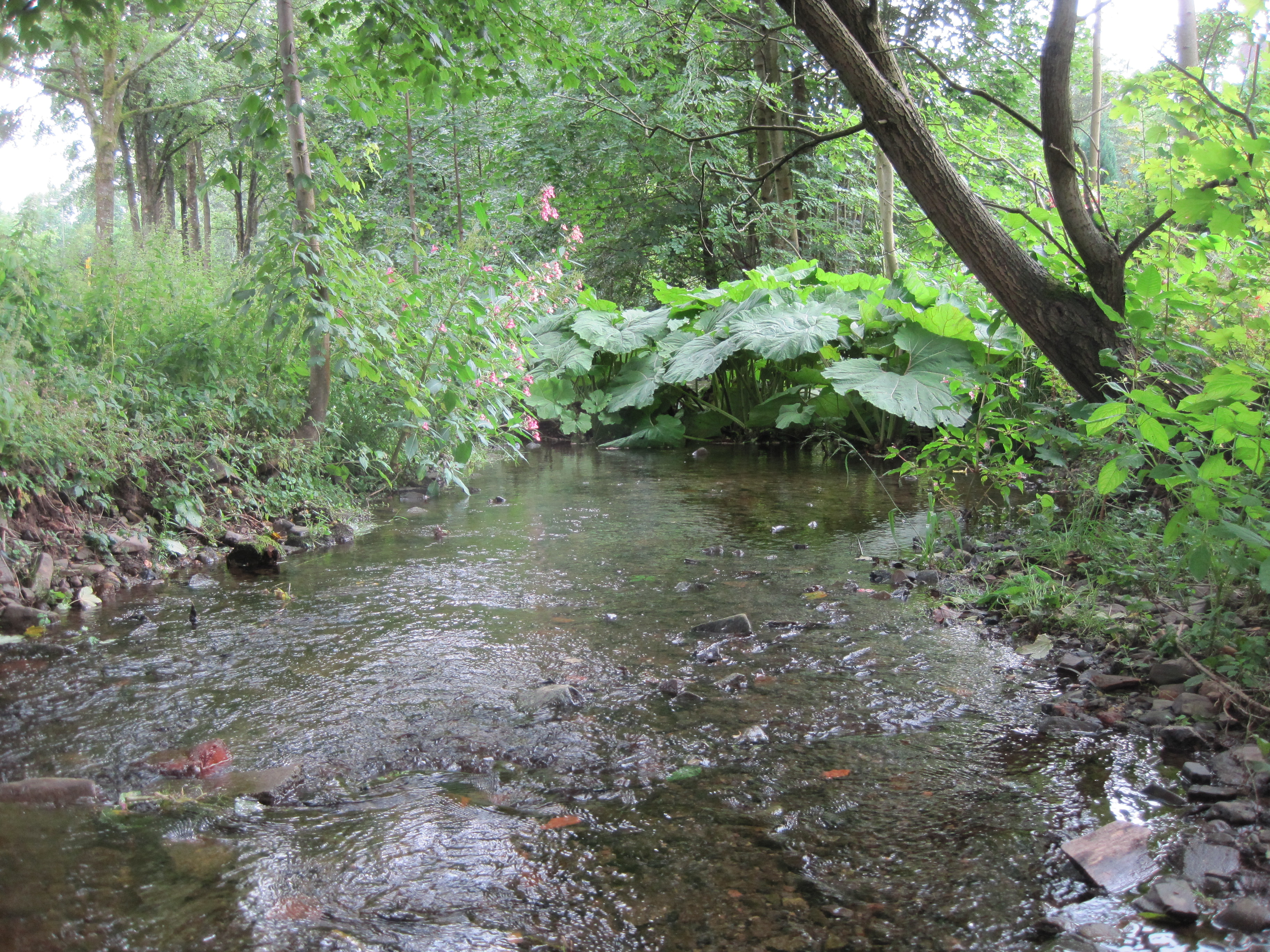 Lerbach Oberhalb des Hüttenteiches in Lerbach